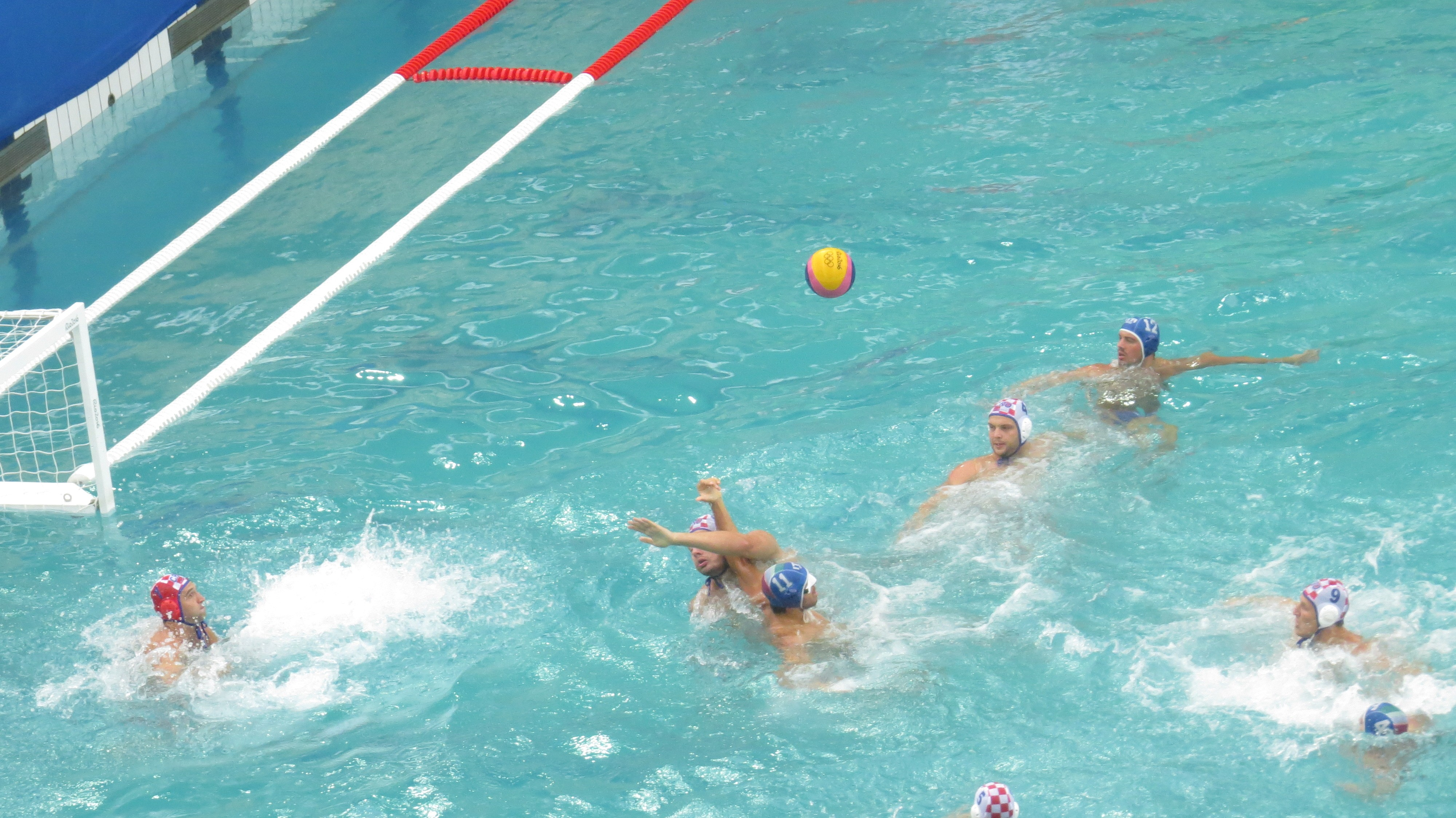 Rio 2016. Polo aquatico. sx50 119